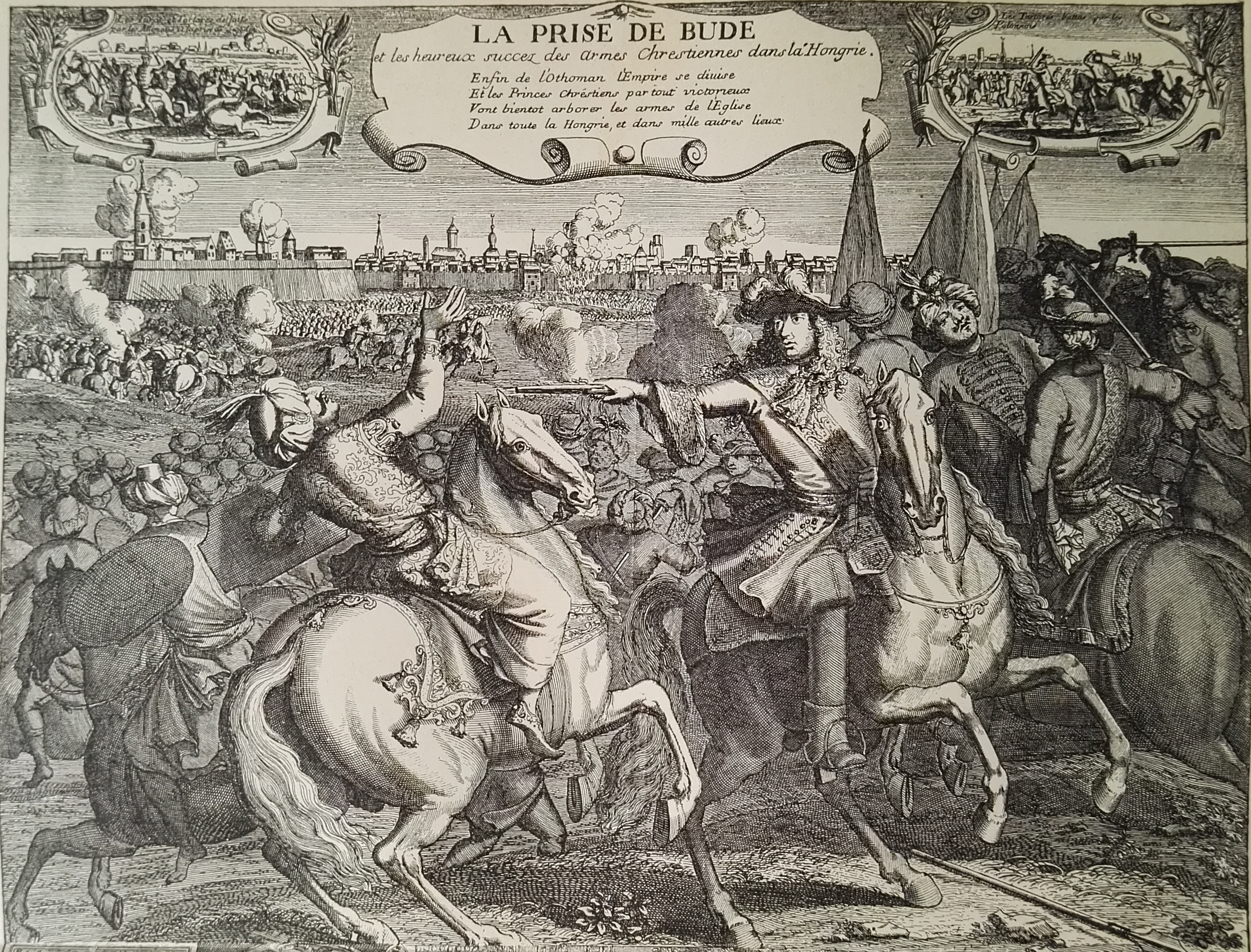 Buda ostroma